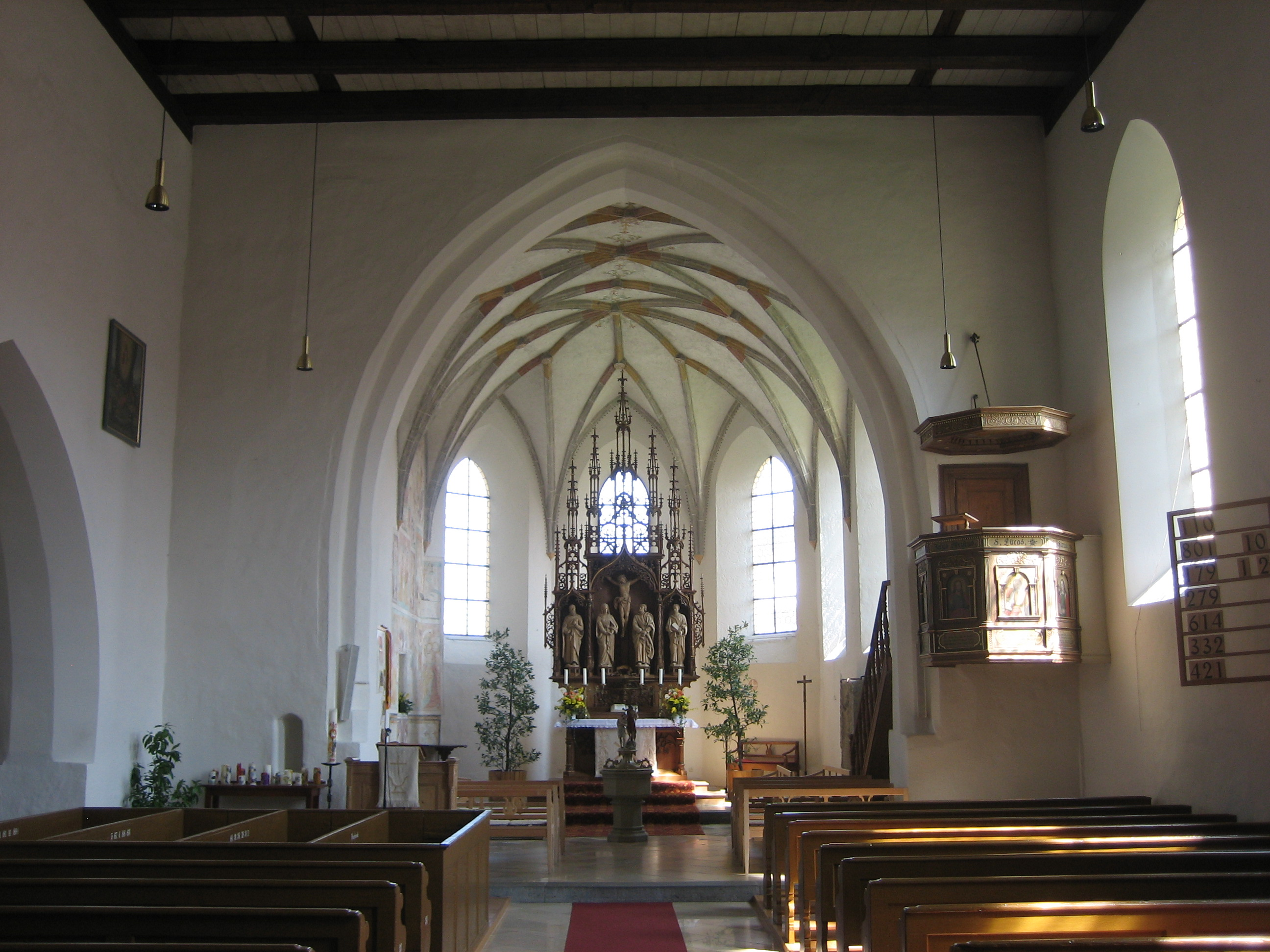 Langhaus und Chor der evangelisch-lutherischen Pfarrkirche Unser Frauen in Woringen.